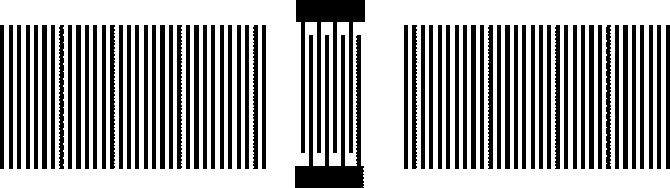 Jednoportowy rezonator z akustyczną falą powierzchniową